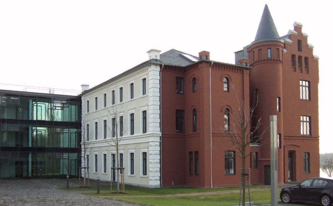 Verwaltungsgebäude des ehemaligen Zementwerks in Bonn